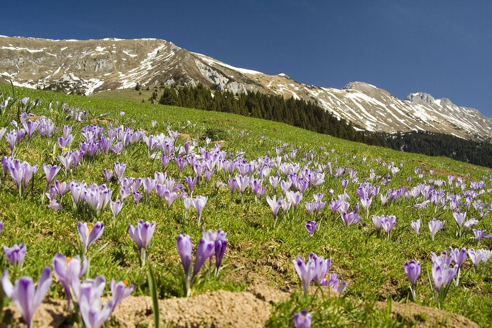 Rakouské alpy